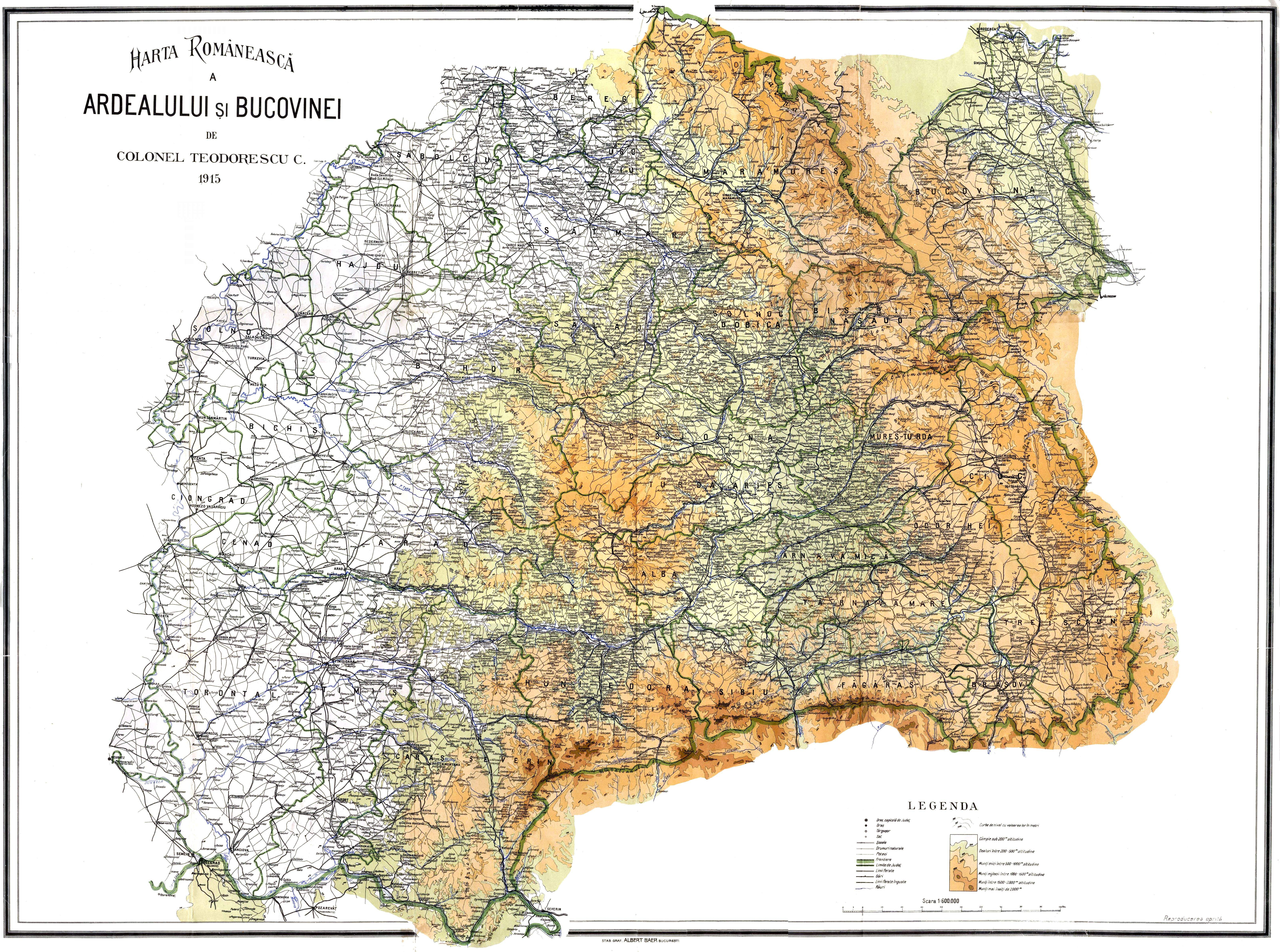 Harta teritoriilor locuite de românii din Imperiul Austro-Ungar: Ardealul (în sensul cel mai larg al termenului) şi Bucovina.